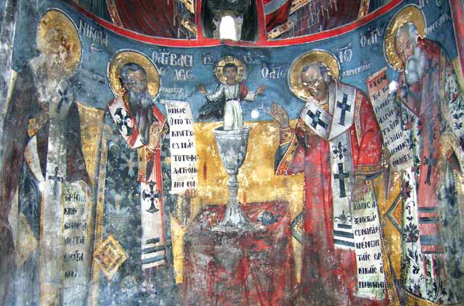 Поклонение на Агнеца, 1827 г., олтарна апсида на църквата Свети Димитър, Охрид.